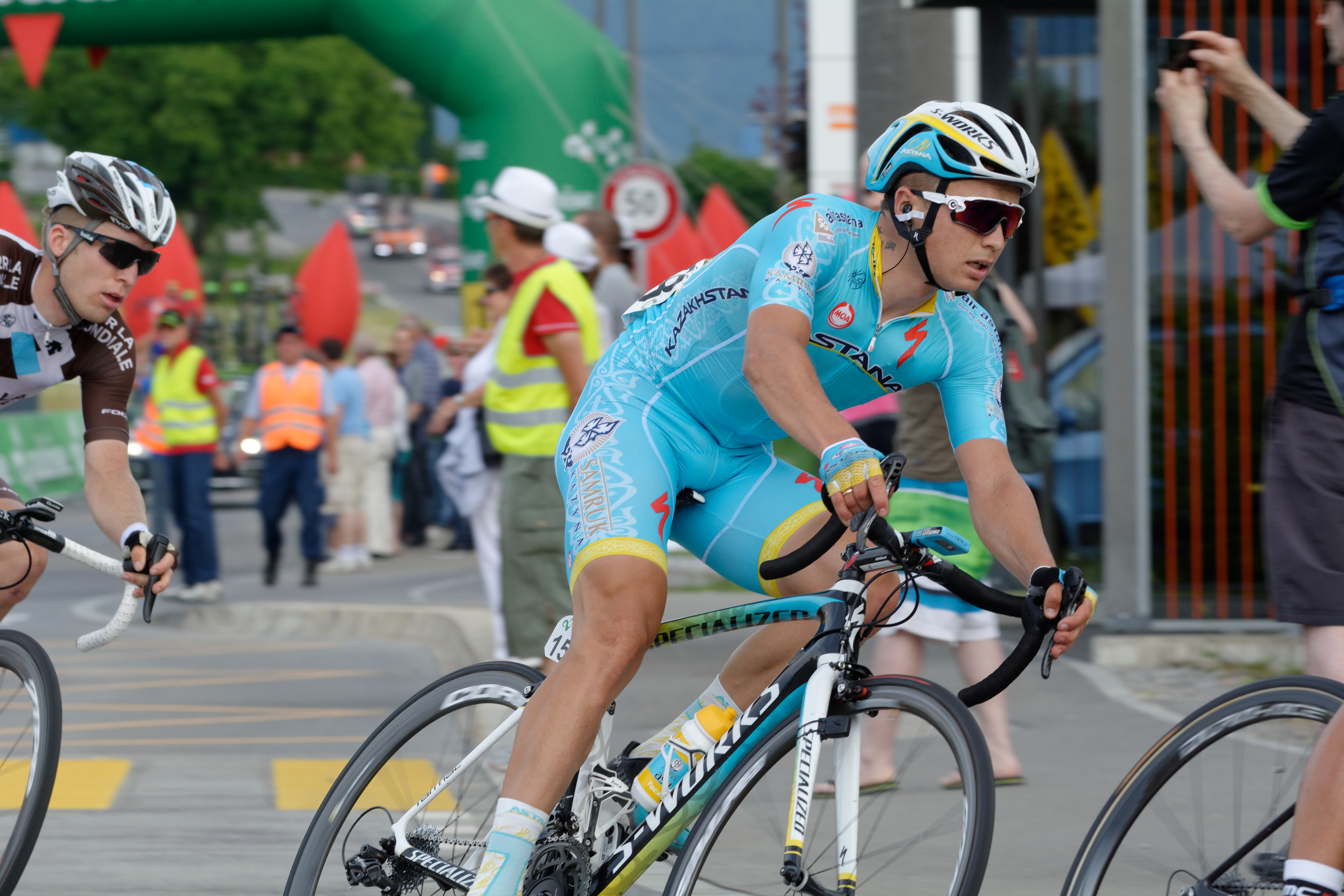 D71_0448_DxO